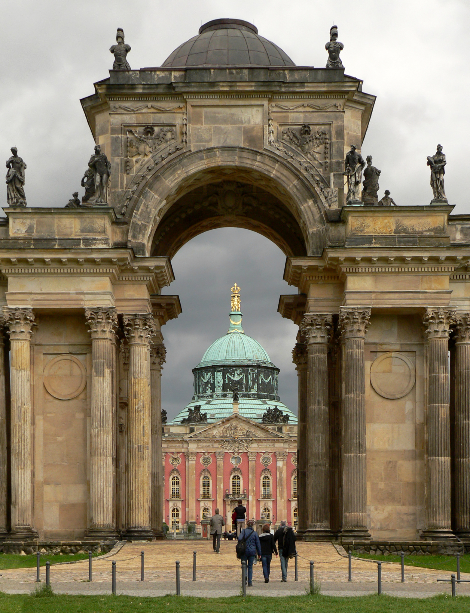 Neues Palais Potsdam durch Triumphbogen